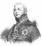 Prince Feredico de York y Albania